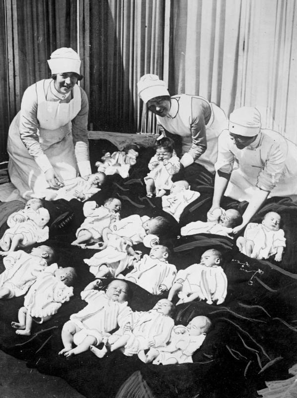 In der warmen Märzsonne von Davos ! Kleine Erdenbürger werden in einem Kinderheim in Davos der lachenden Frühjahrssonne ausgesetzt.